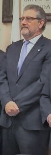 El rector de la Universidad de Zaragoza, José Antonio Mayoral en el año 2017.